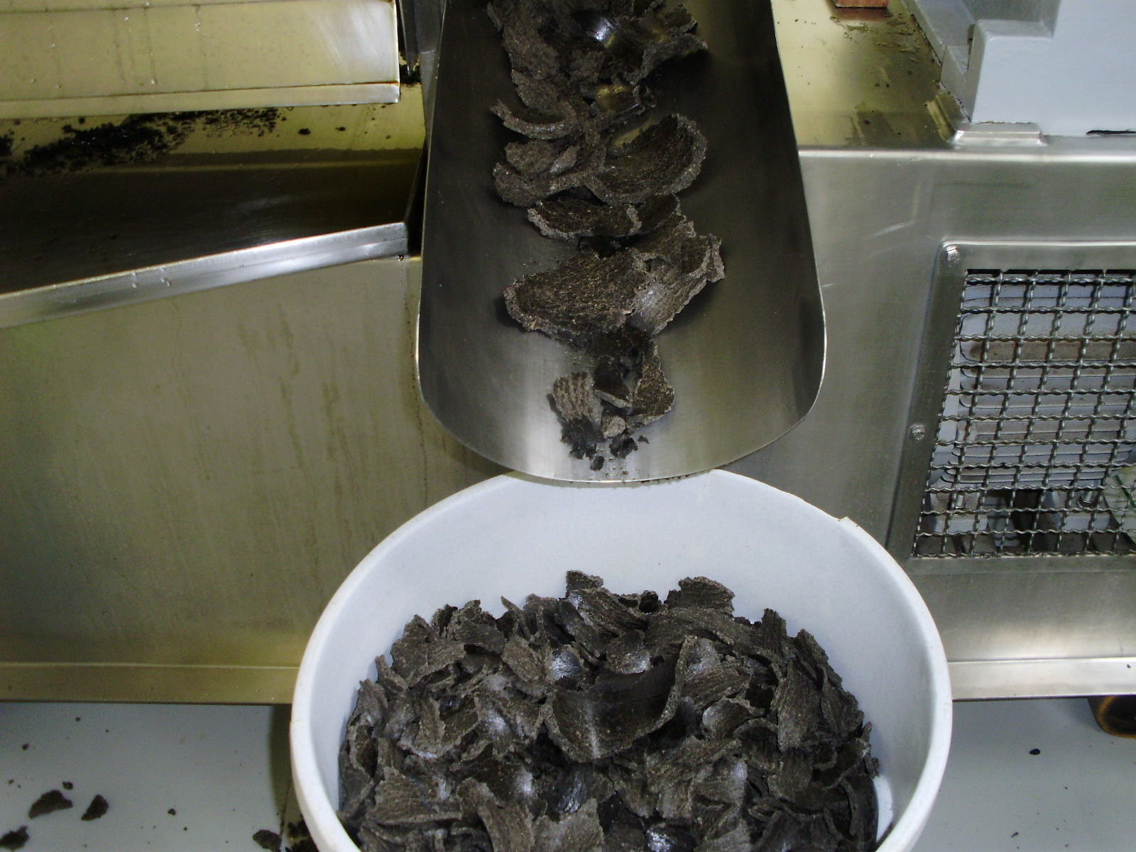 Plantios de girassol em Rio de Janeiro em projeto apoiado pela FAPERJ